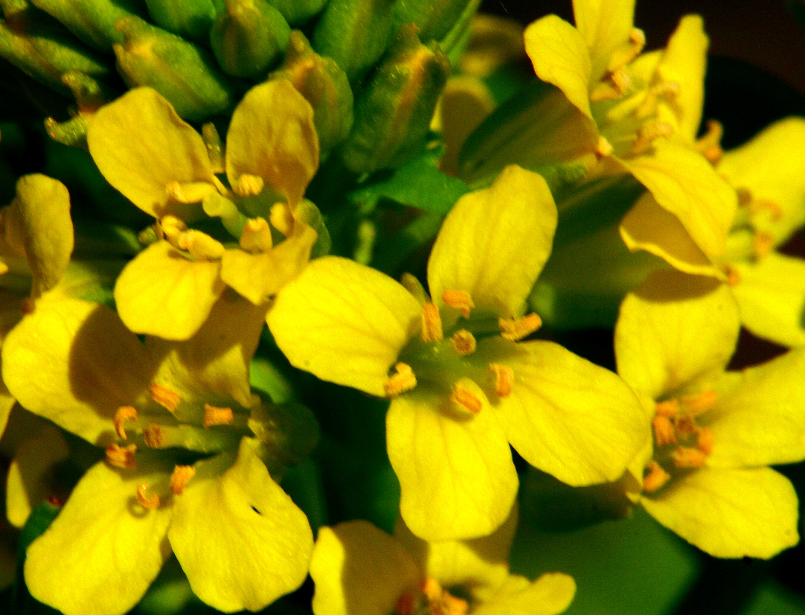 Erba di Santa barbara comune - Località : Praloran, Limana (BL), 319 m s.l.m.